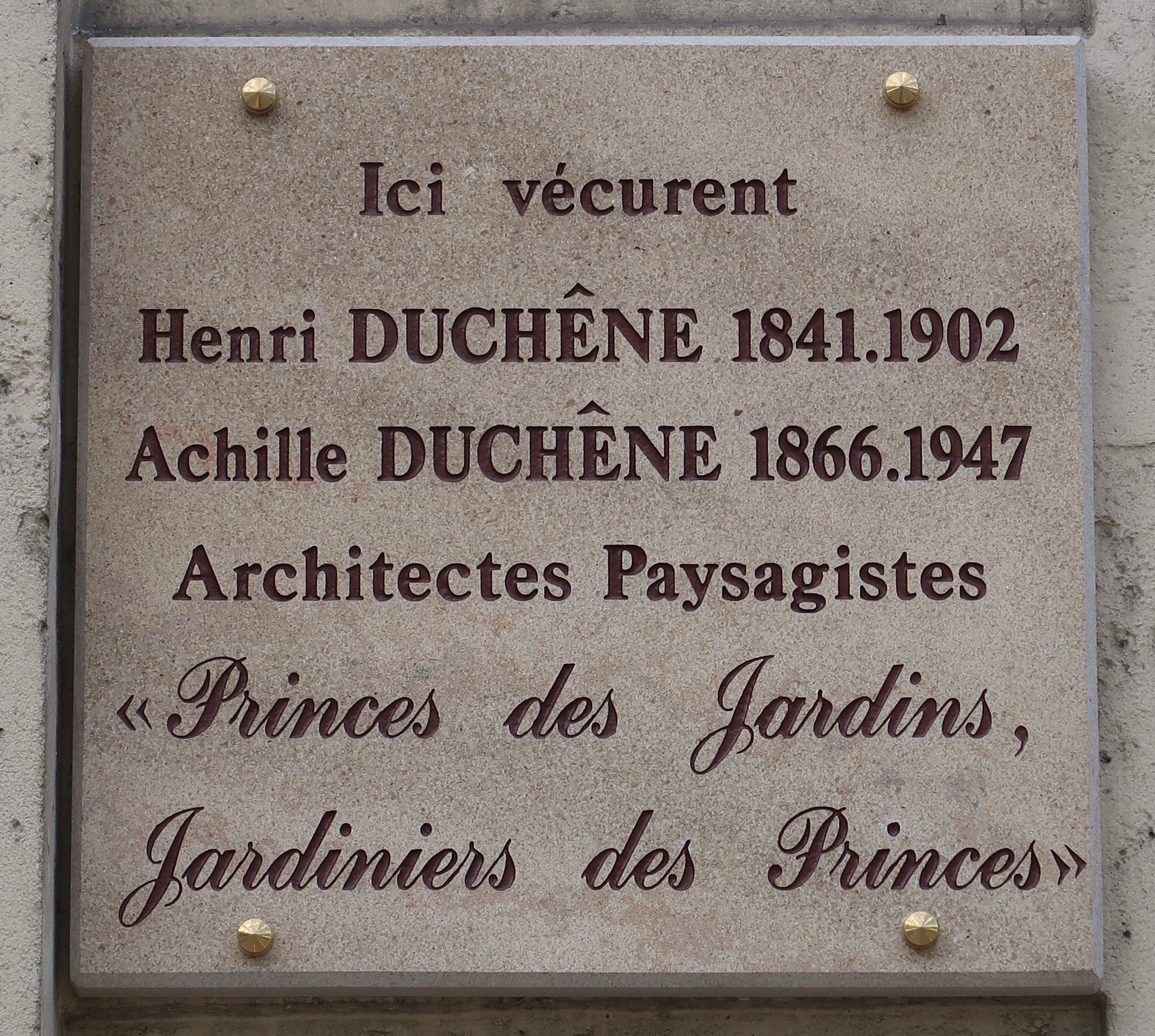 Plaque en hommage aux architectes paysagistes Henri et Achille Duchêne, 10 avenue de New-York (Paris, 16e).